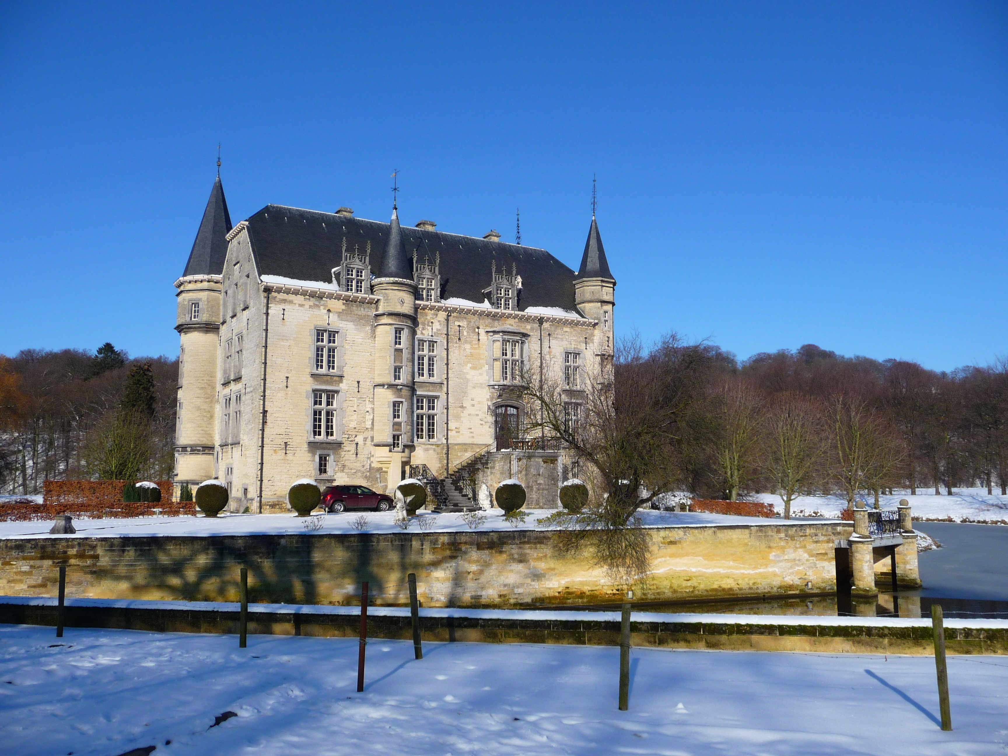 Kasteel Schaloen in Valkenburg